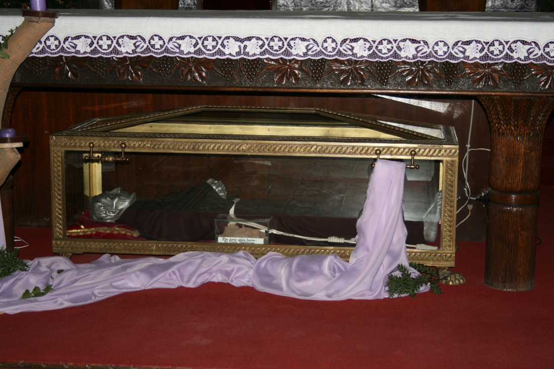 Crkva svetog Ivana Kapistrana u Iloku